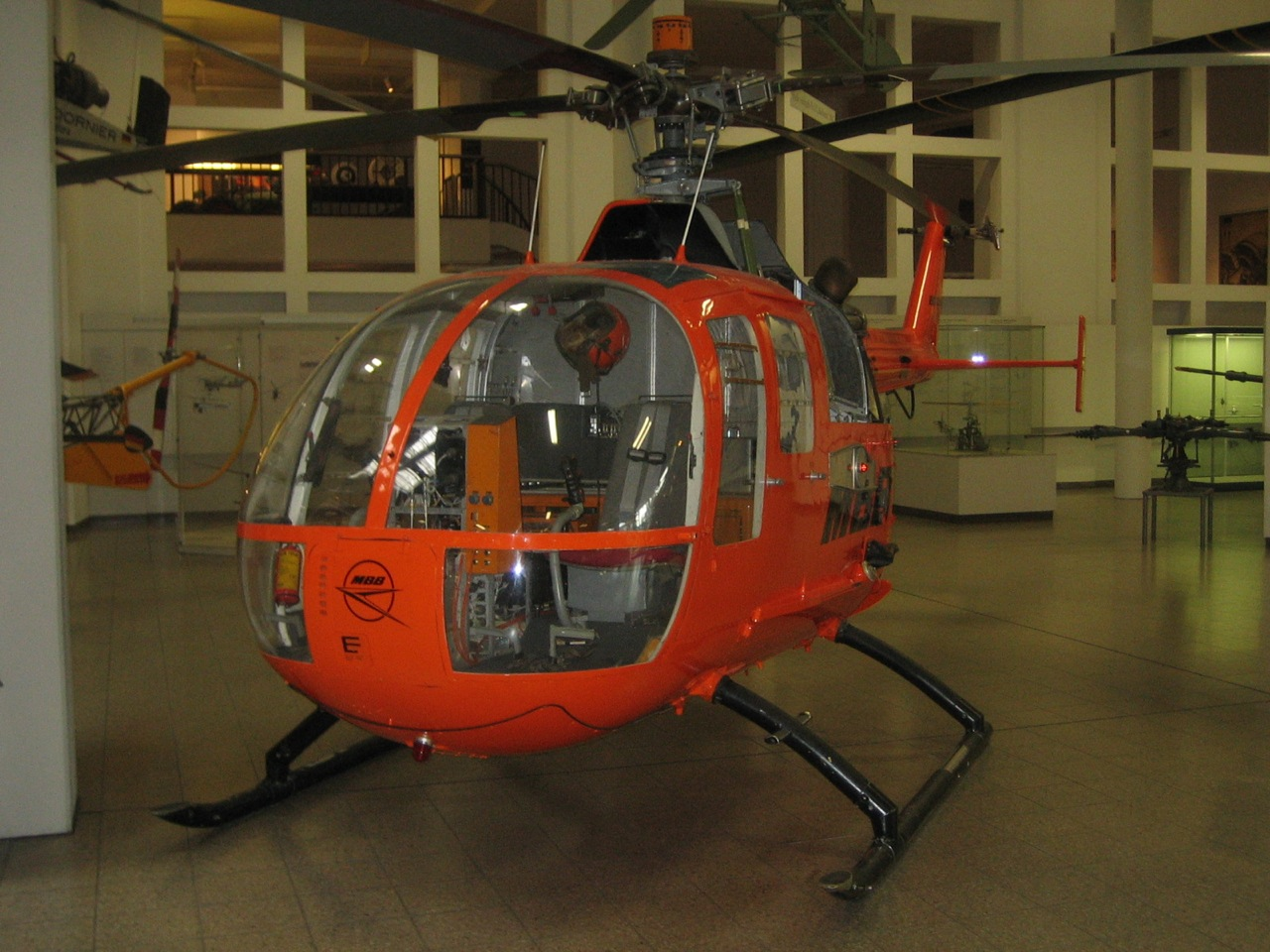 MBB BO 105 at Deutsche Museum, Munich